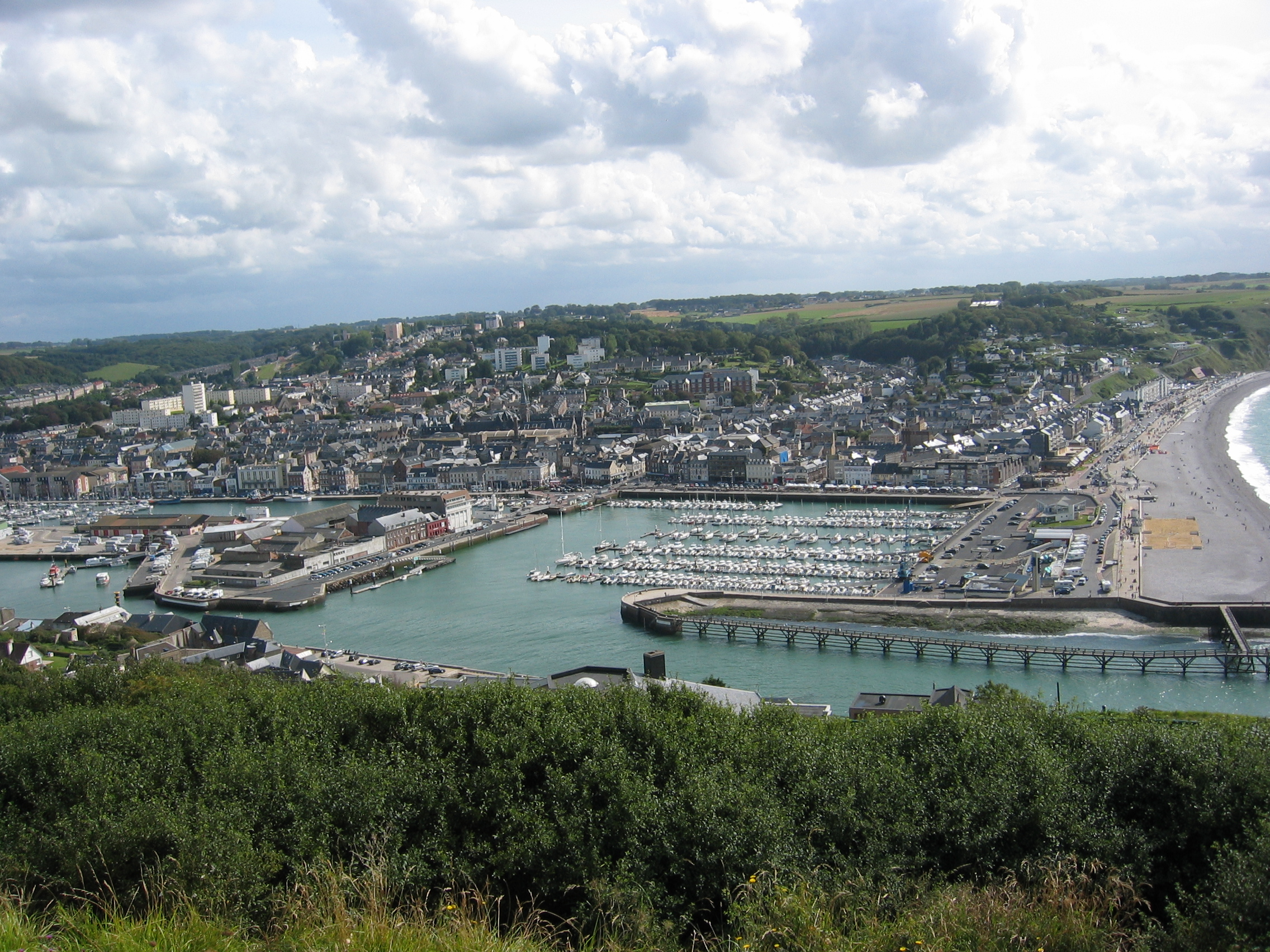 Fécamp (Seine-Maritime), vue des hauteurs de la falaise, près de la chapelle Notre-Dame du Salut, Pays de Caux, Normandie, France